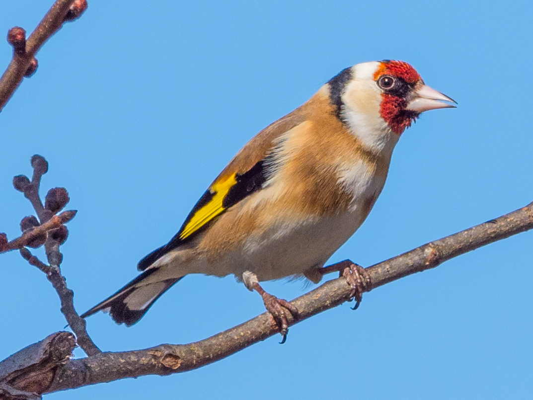 Vaxholm, Stockholm, Sweden, April 2018